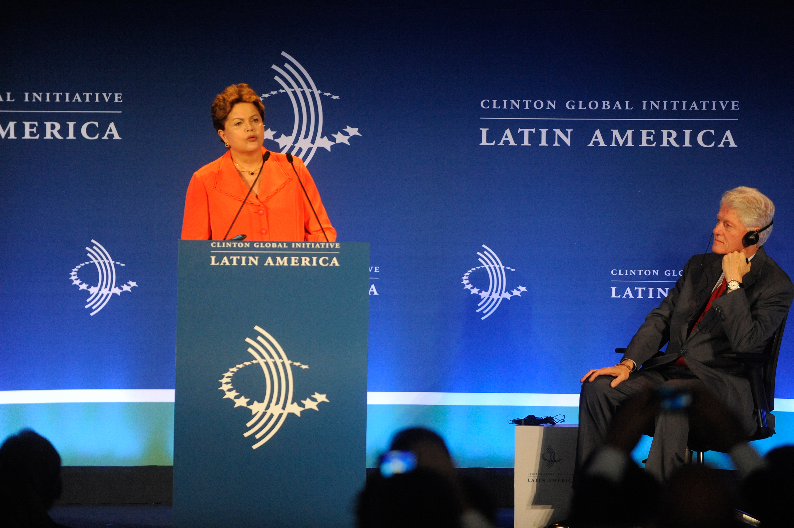 Rio de Janeiro - A presidente Dilma Rousseff participa da abertura do evento Clinton Global Initiative Latin America, promovido pelo ex-presidente norte-americano Bill Clinton.